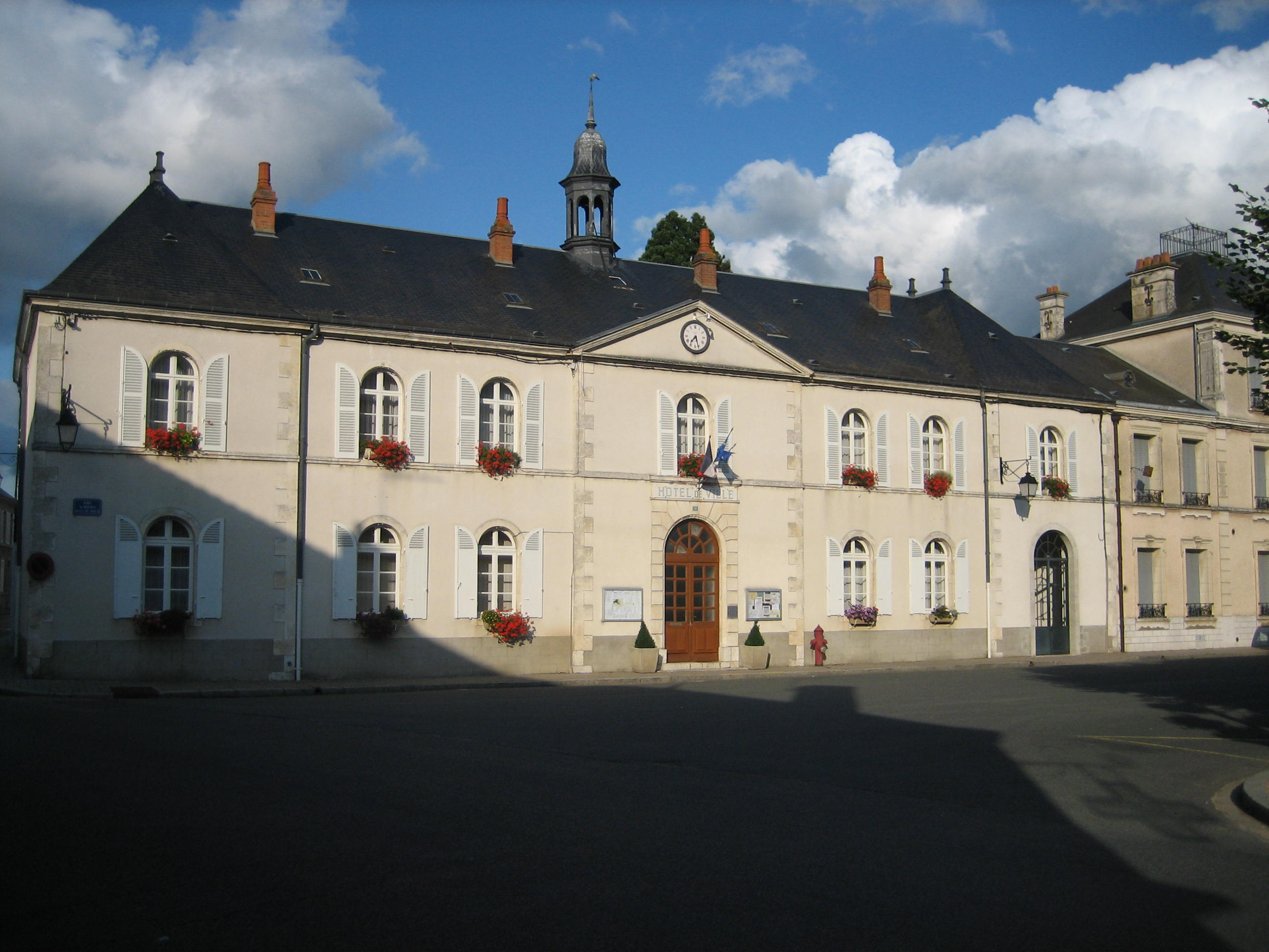 Mairie de Saint-Benoît-sur-Loire, Loiret, Centre, France